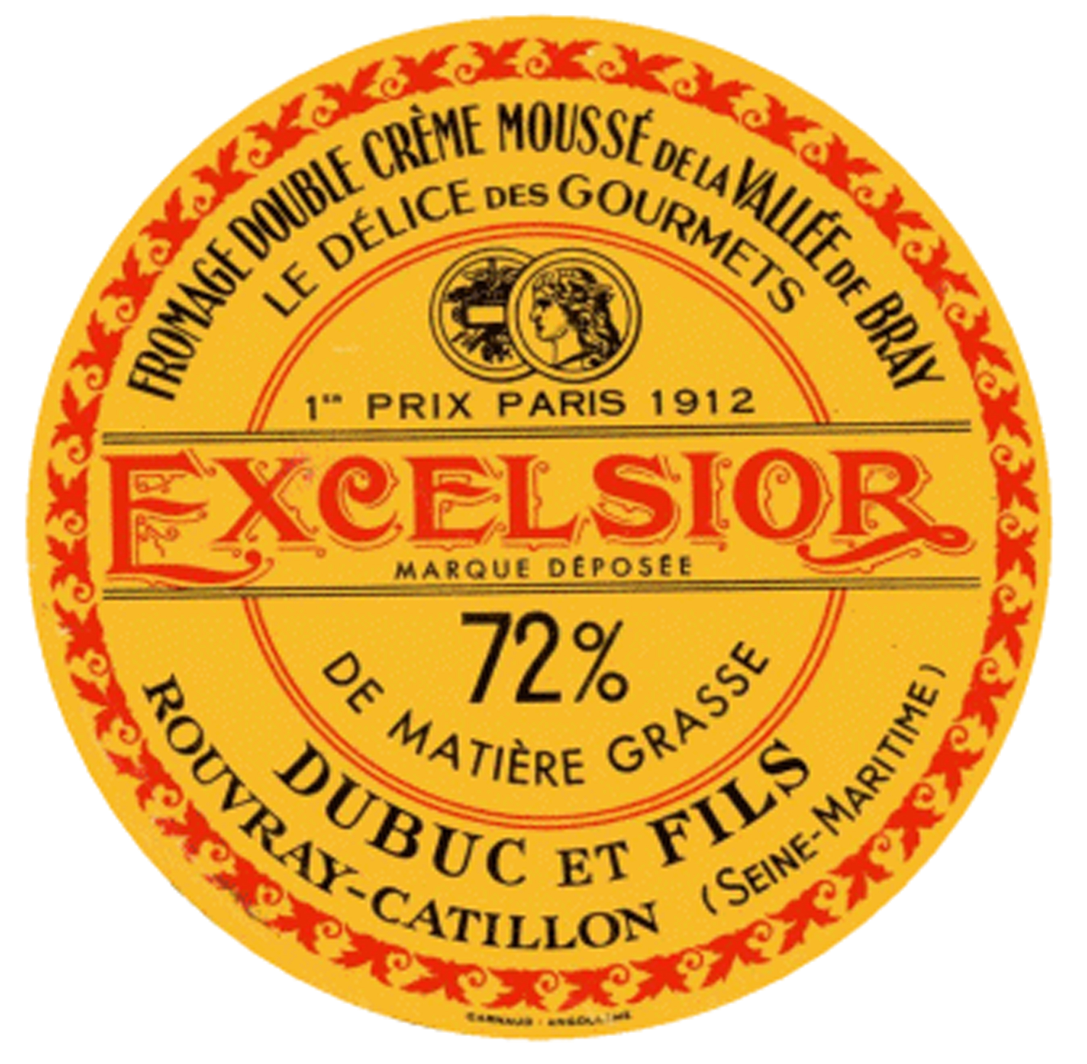 Excelsior ou Délice des gourmets, rebaptisé brillat-savarin dans les années 1930